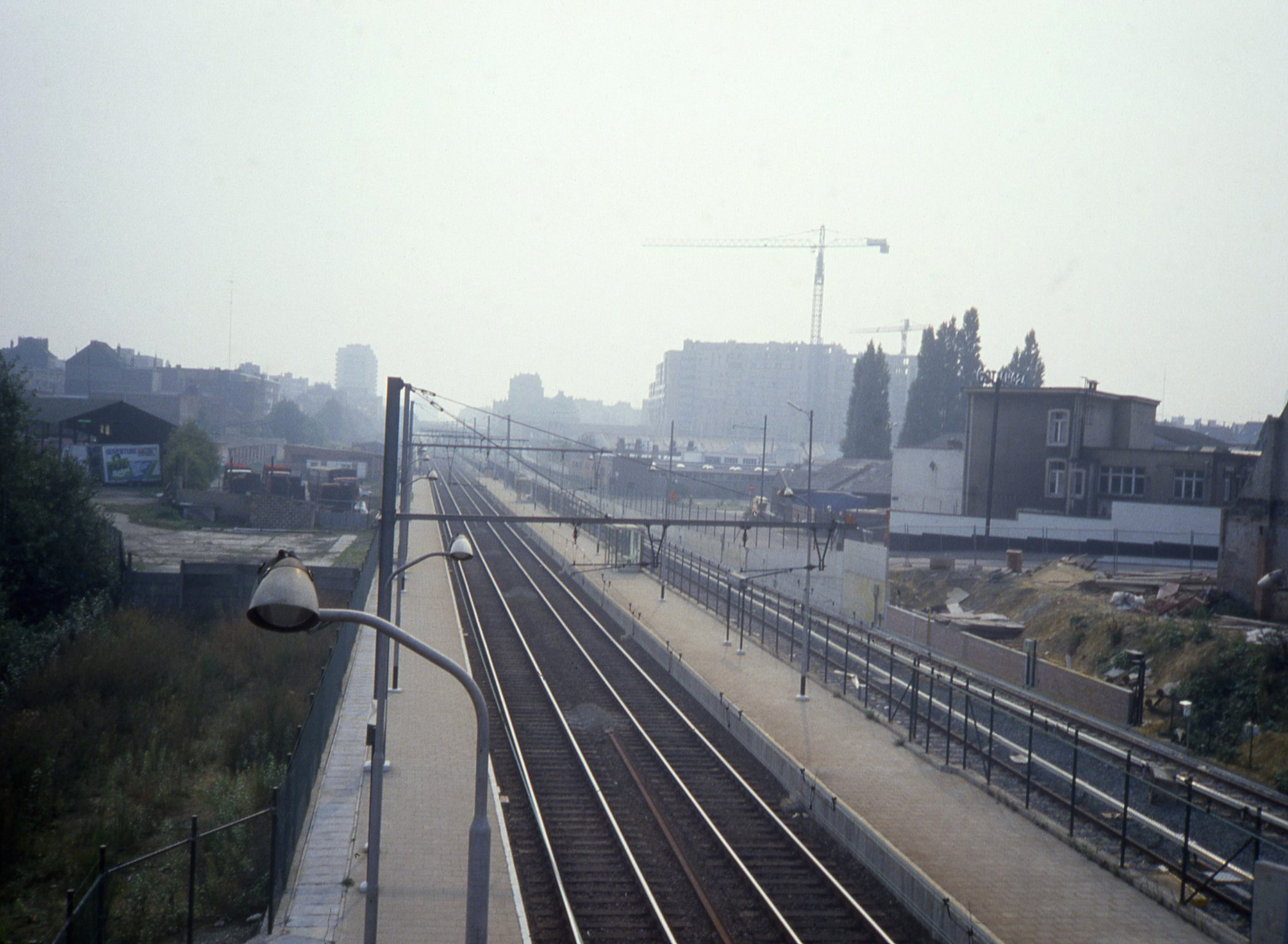 Pannenhuis station langs spoorlijn 28, nu hernoemd in Thurn en Taxis station.